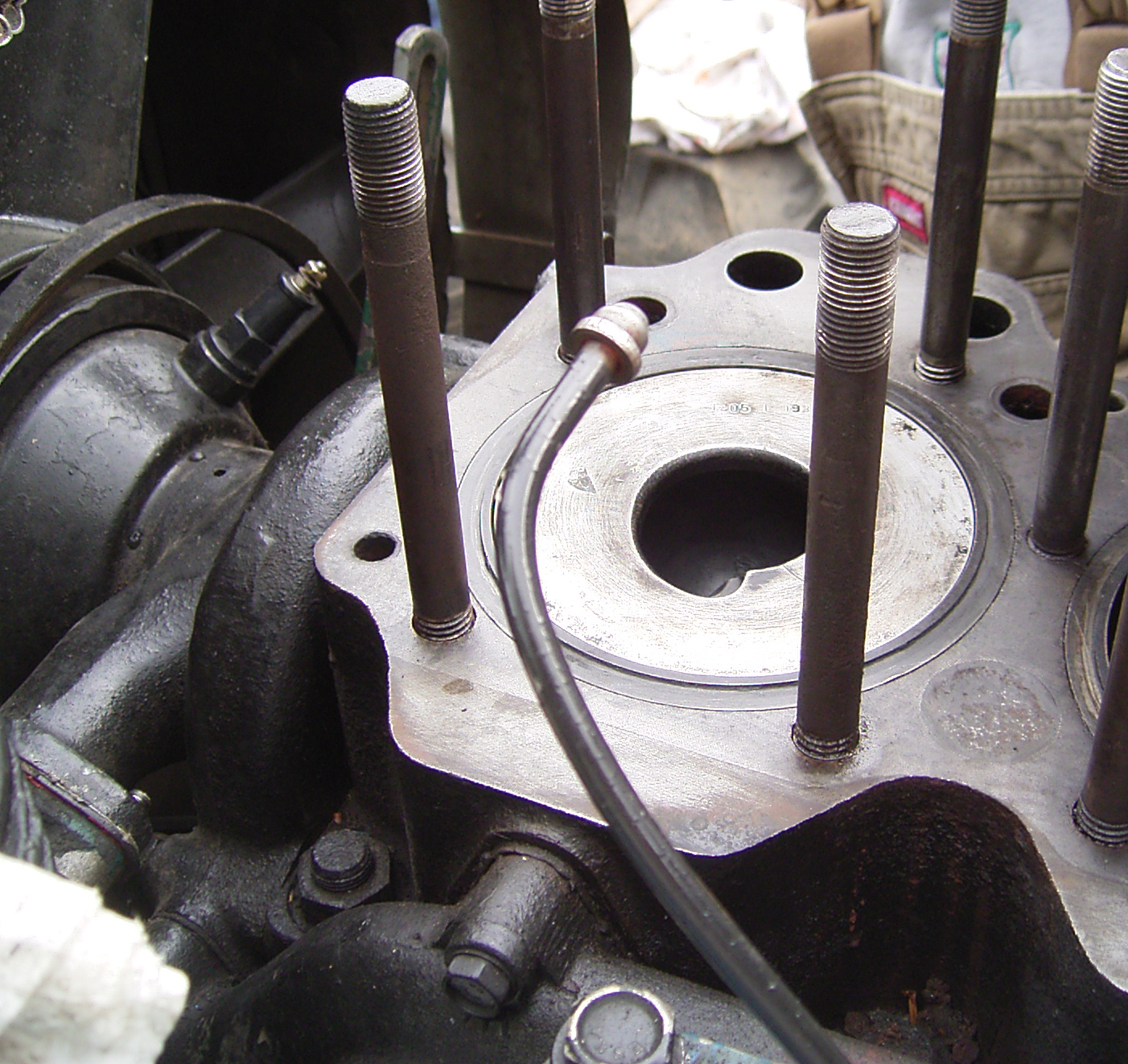 4-Zylinder-Dieselmotor der ZT-300er-Reihe, M-Verfahren